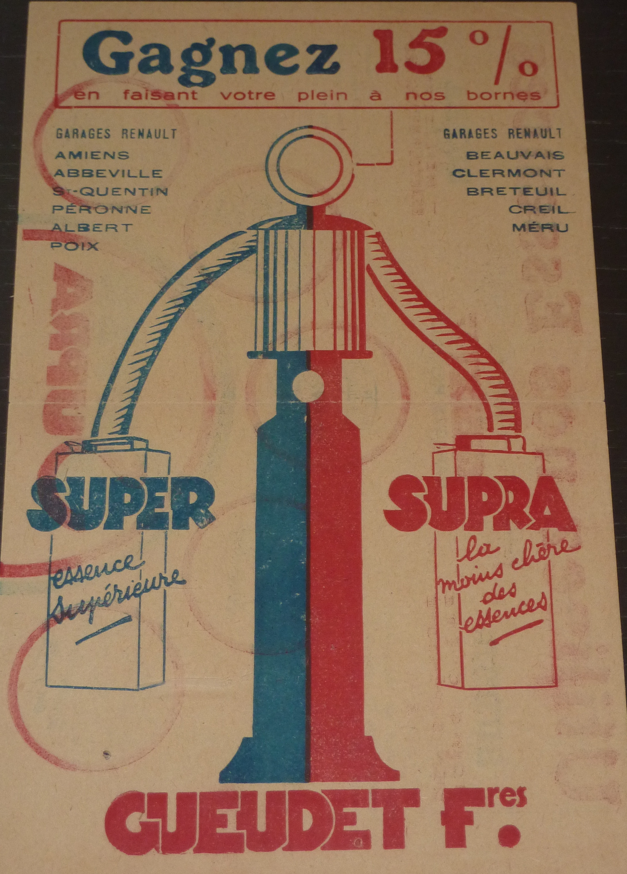 Publicité pour les activités carburant du groupe Gueudet